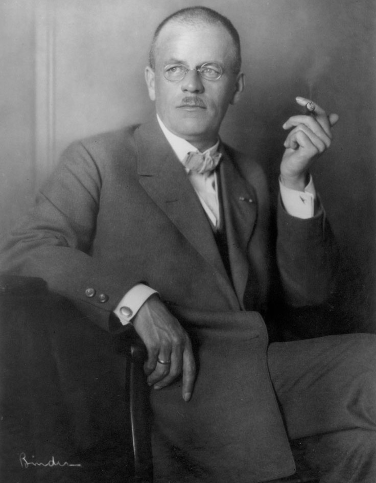 Portrait des Gründungsdirektors Georg Heinrich Emmerich